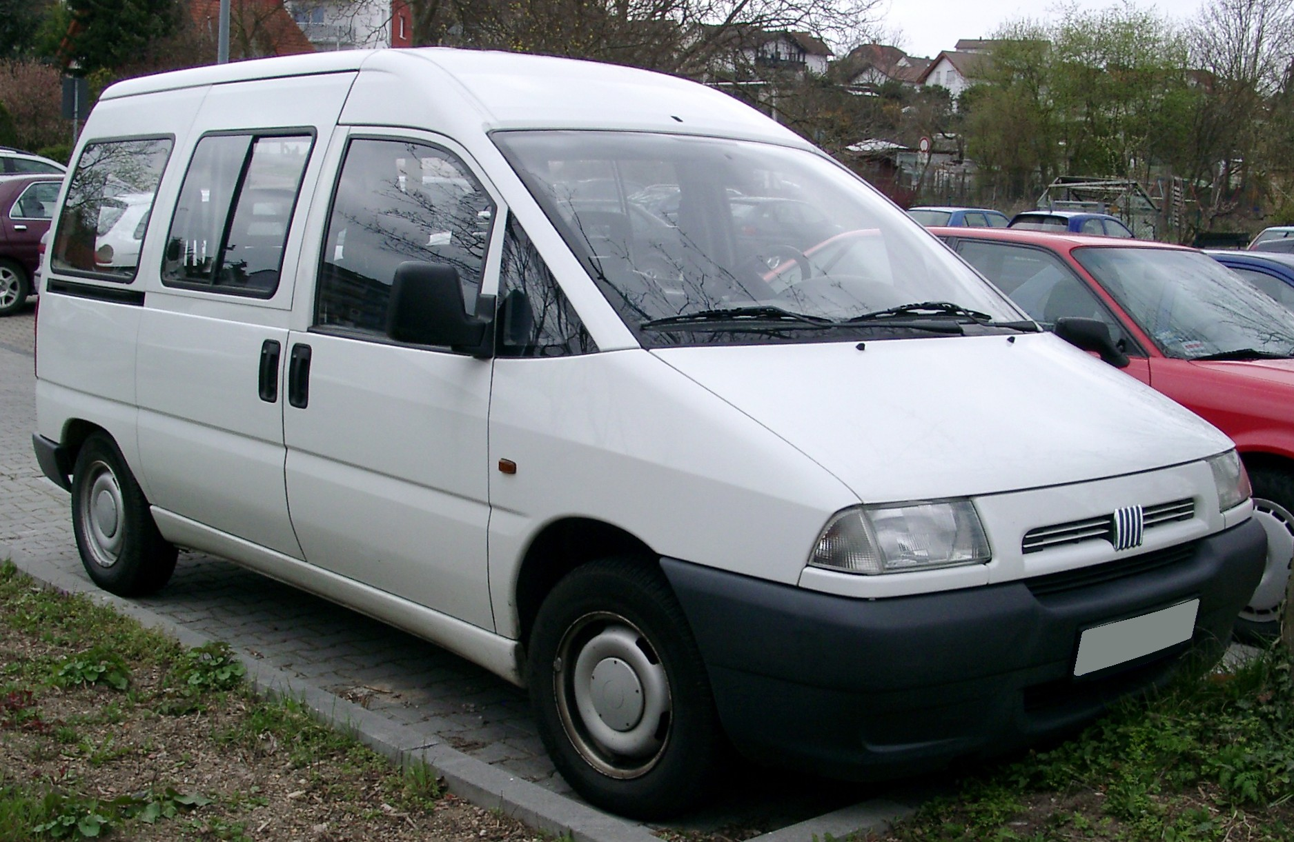 Fiat Scudo Mk I